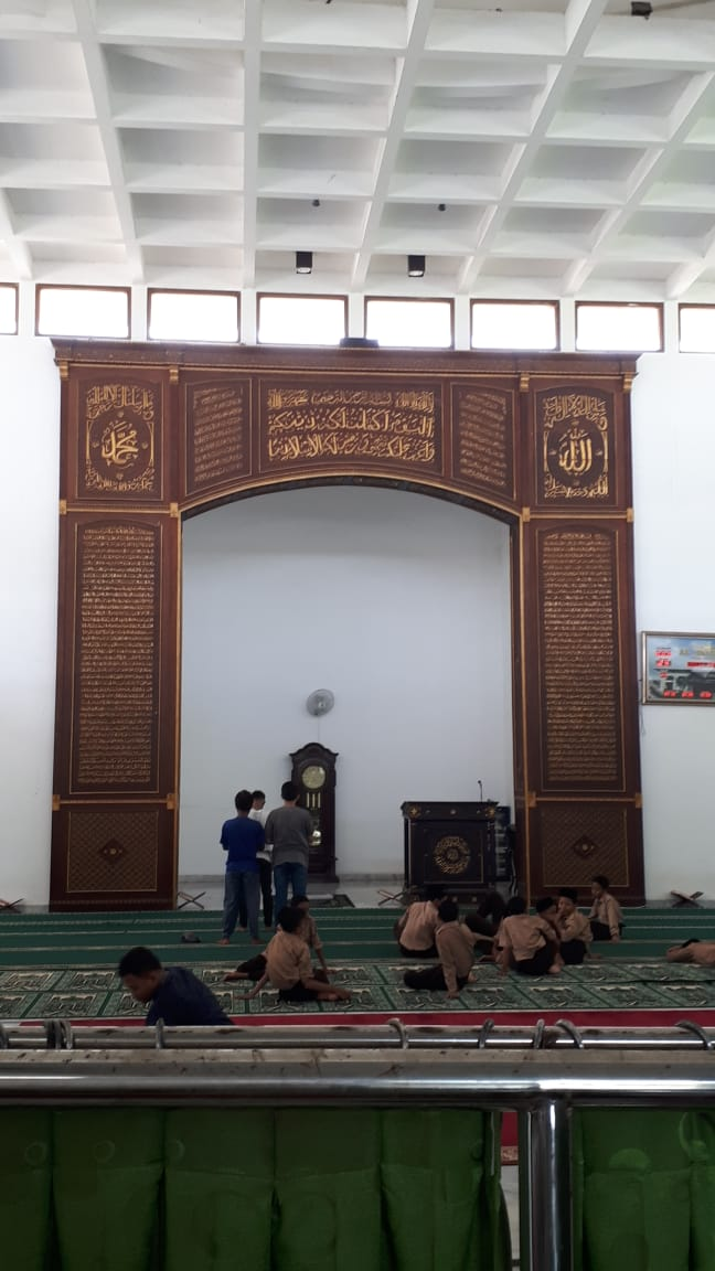 Mihrab Masjid Agung Al-Istiqomah yang digunakan sebagai tempat imam memimpin shalat